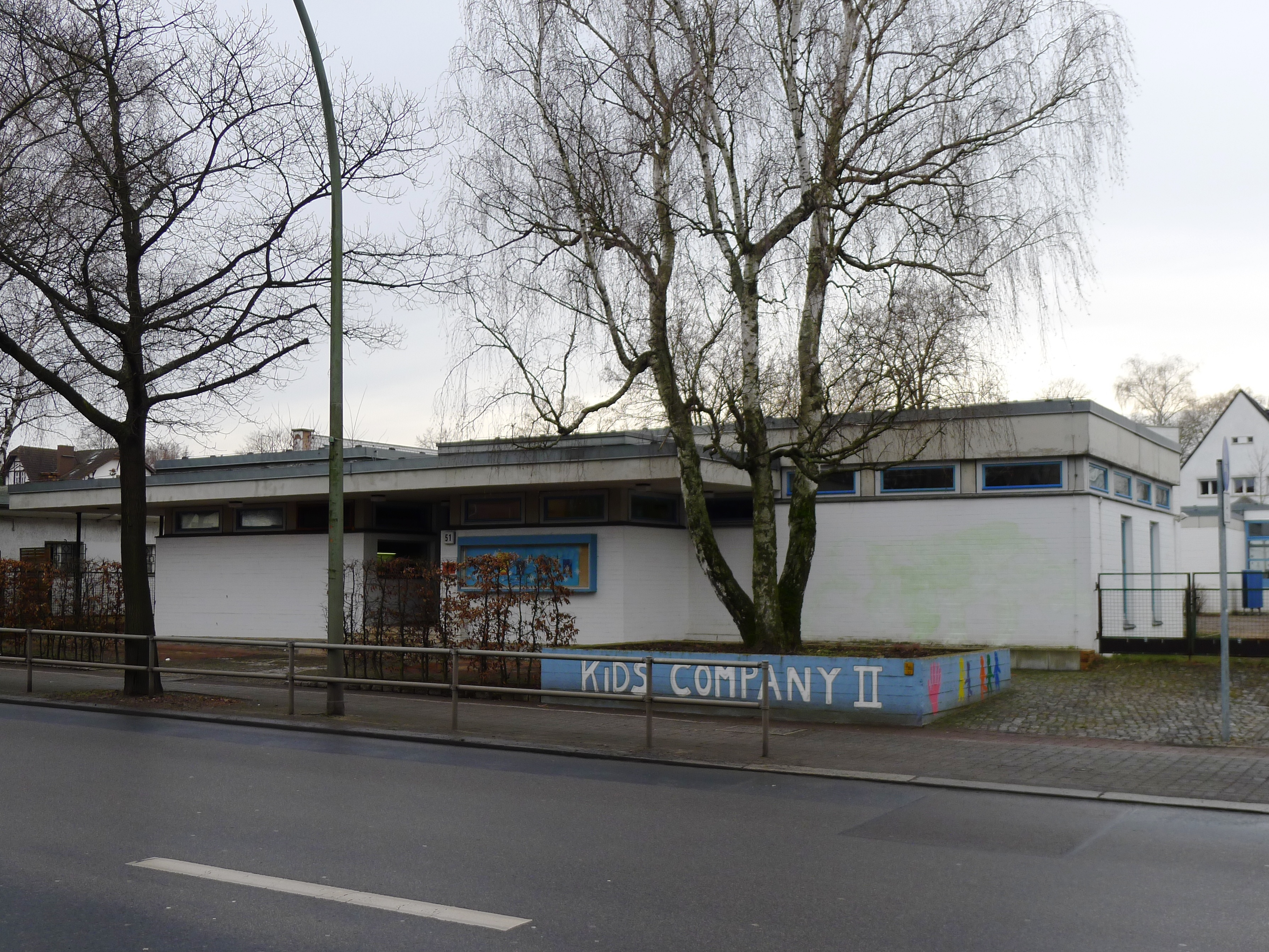 Blick auf die Kirche von der Straße